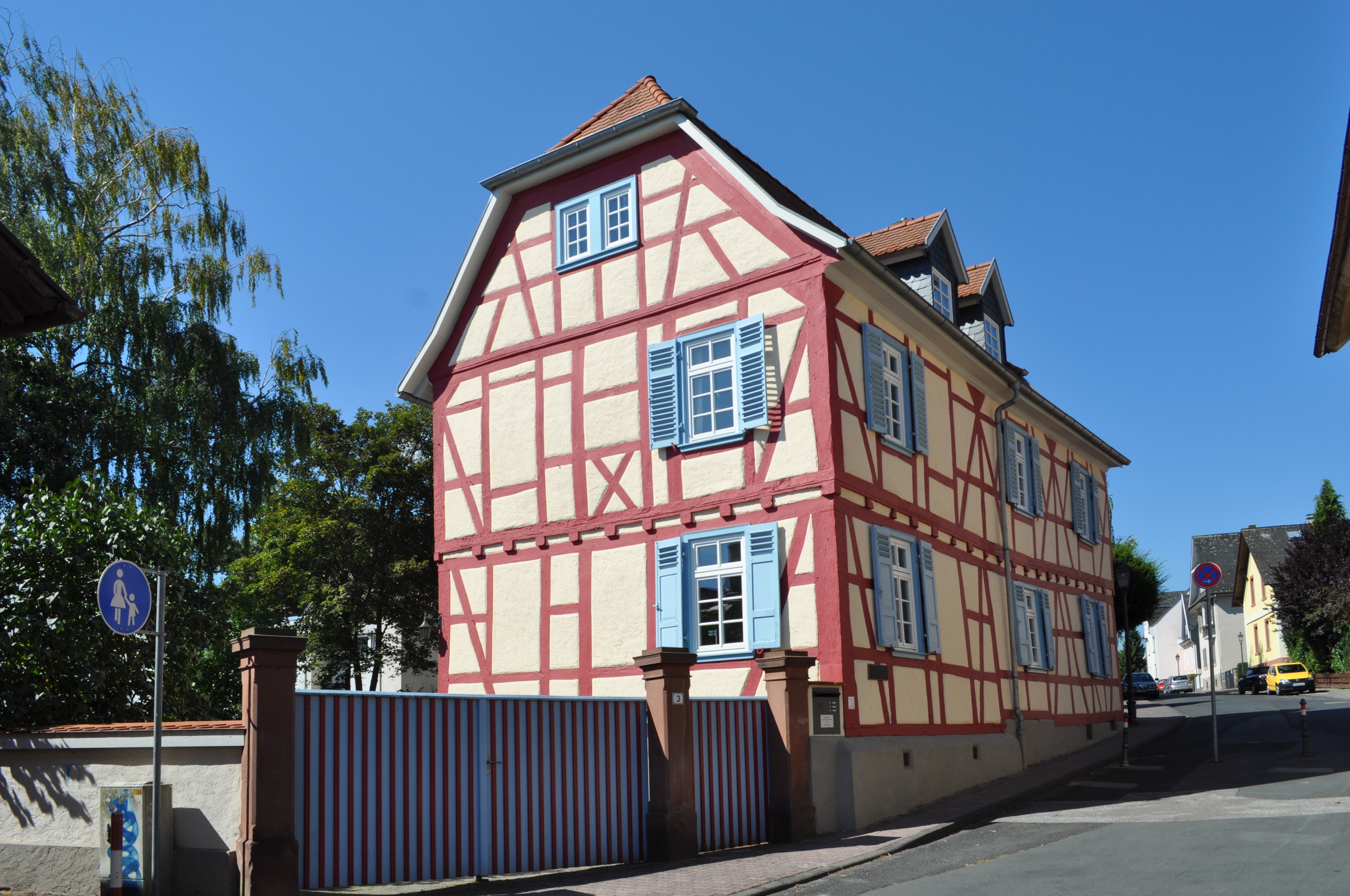 Alter Pfarrhaus in Gonzenheim, erbaut 1728